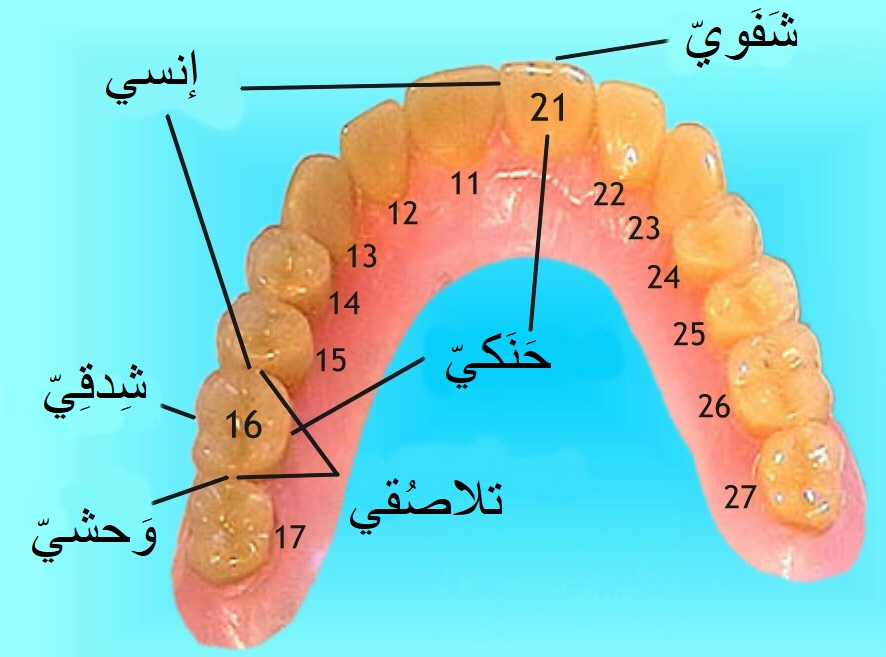 صورة توضح مصطلحات الفم وأماكنها